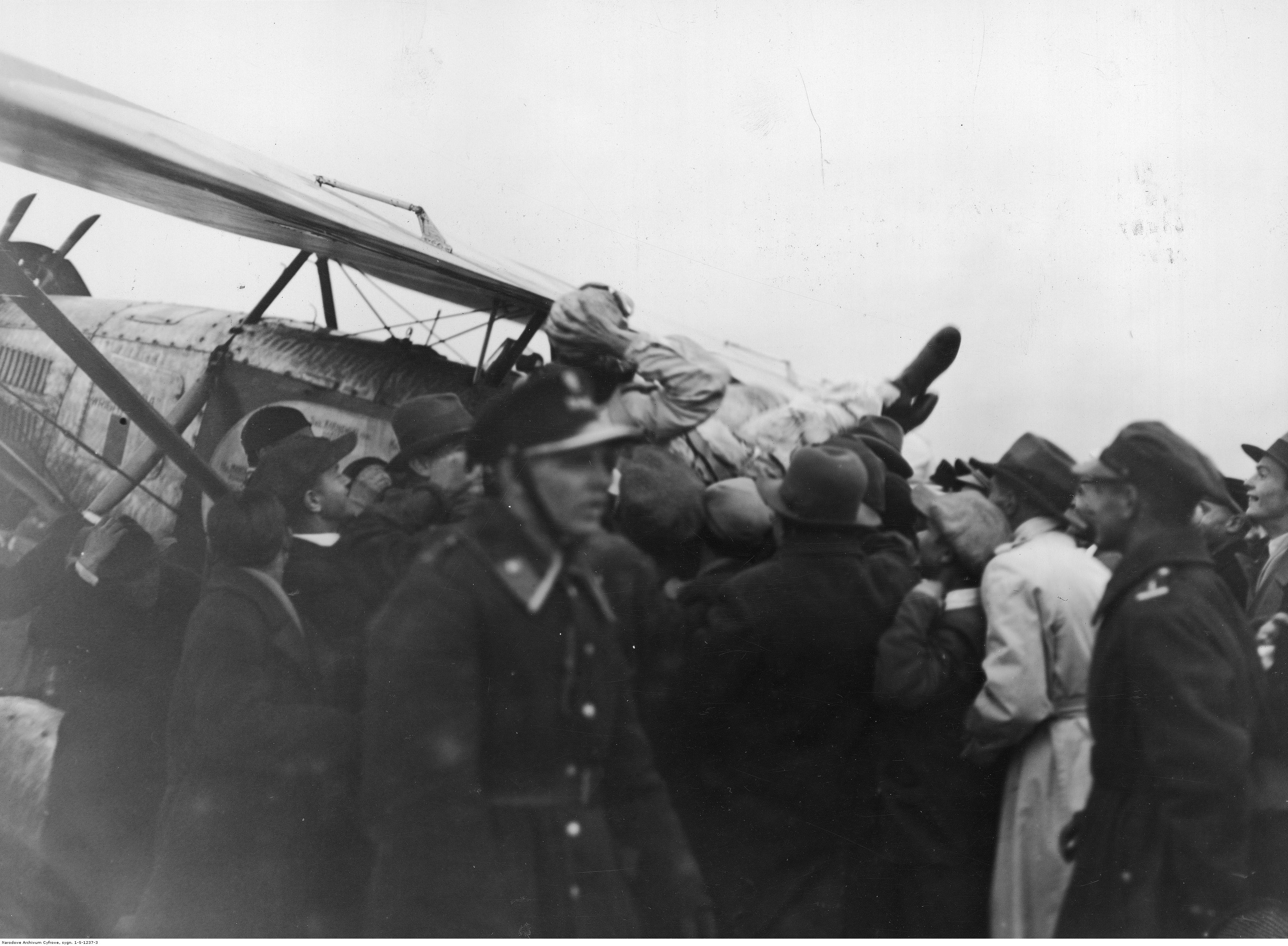 Publiczność niosąca na warszawskim lotnisku kapitana Stanisława Karpińskiego po rajdzie nad Azją Mniejszą samolotem Lublin R-Xa SP-ABW.